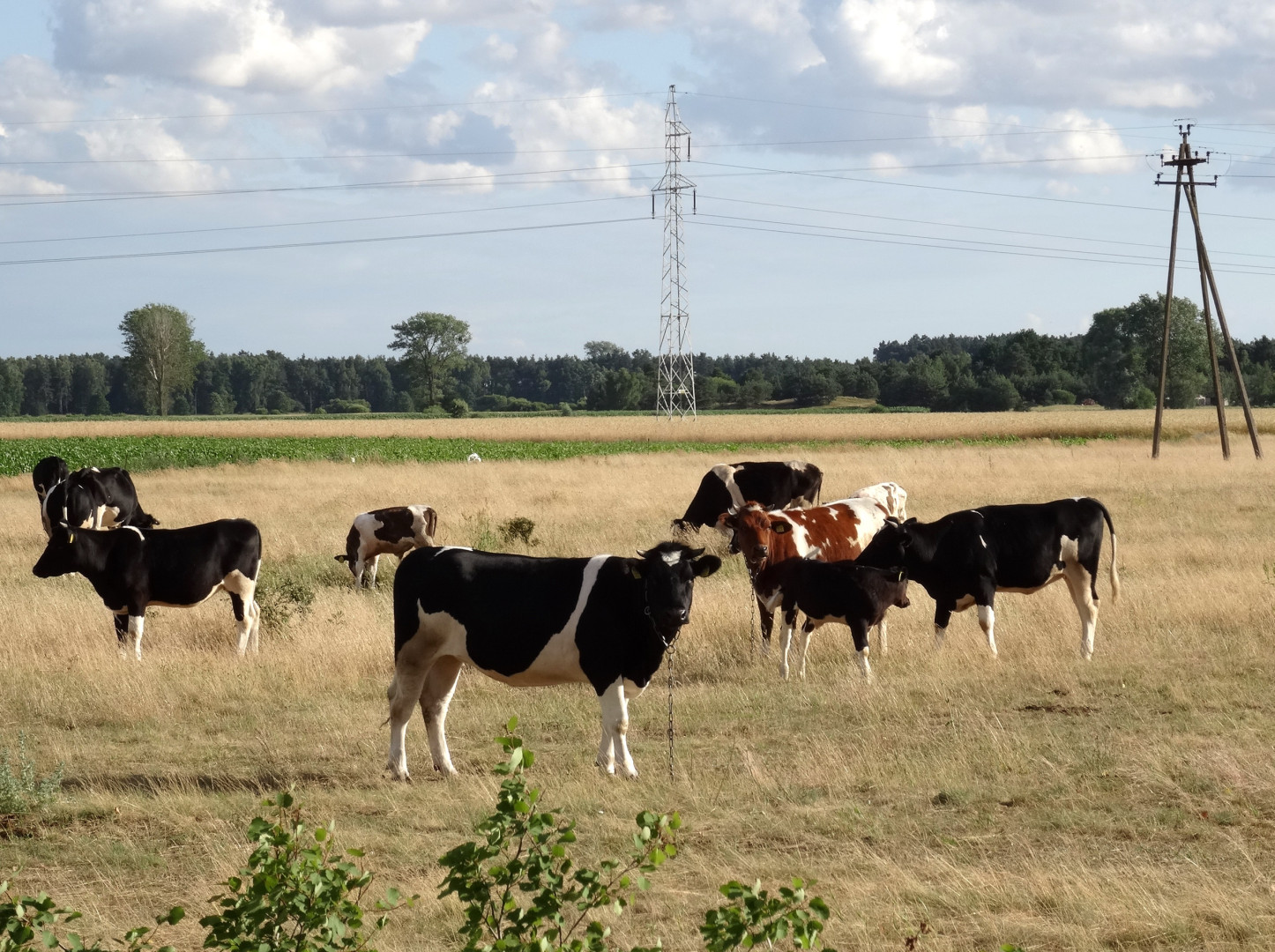 Tarkowo Dolne, gmina Nowa Wieś Wielka, powiat bydgoski